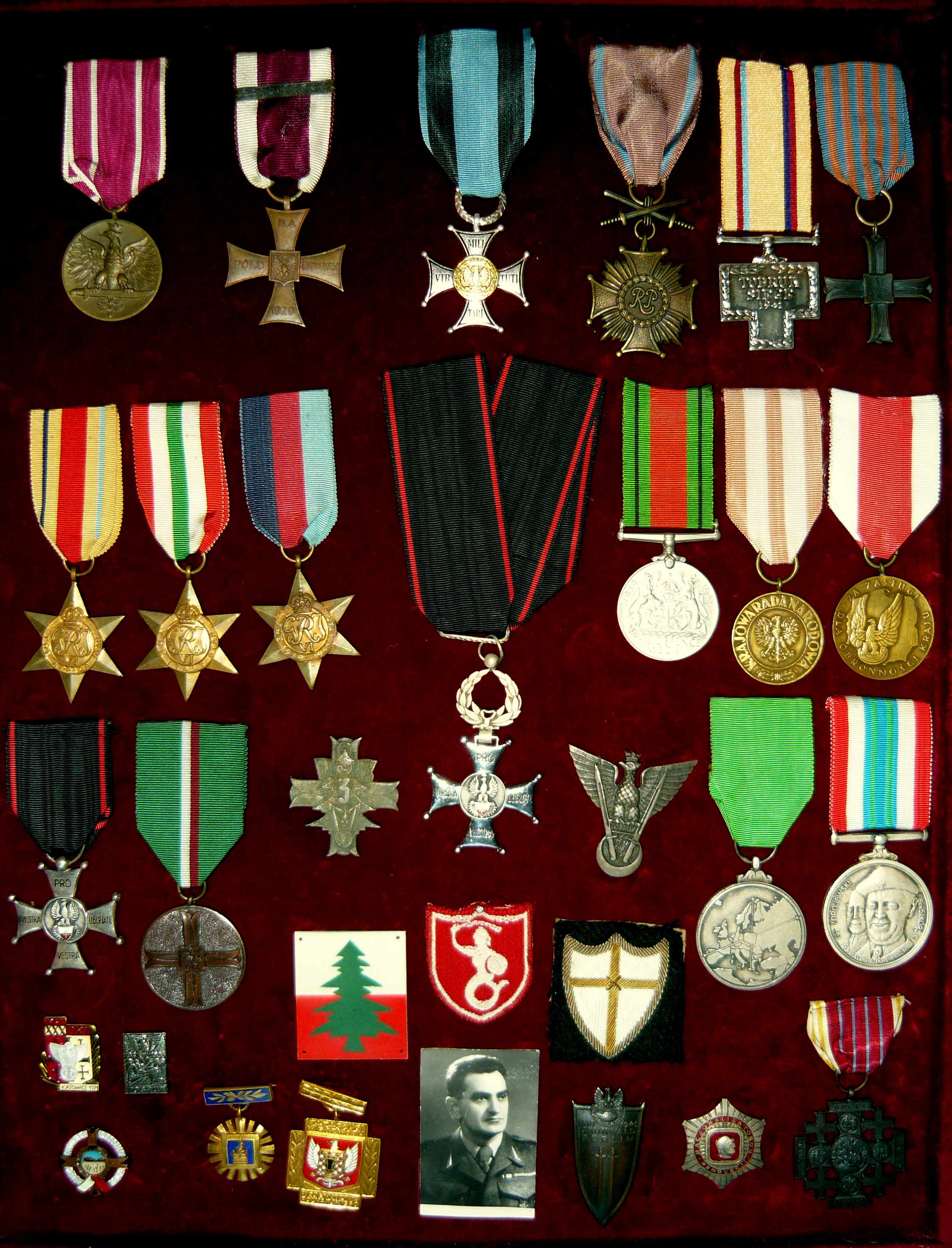 medale i odznaczenia, Józef Wawrzyniak